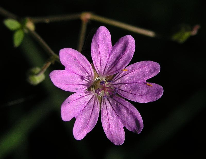 Pyrenäen-Storchschnabel (geranium pyrenaicum), aufgenommen am Rand eines Feldweges in der Nähe von Oppenrod